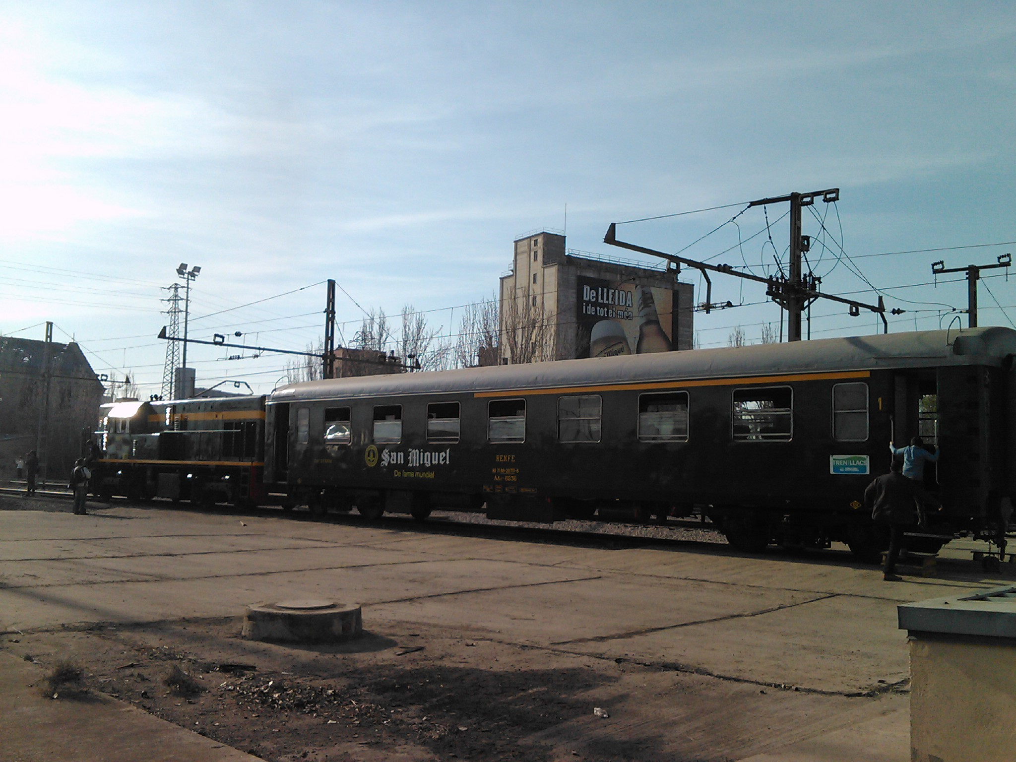 Tren dels llacs amb una locomotora dièsel de les conegudes com a "yeye" estacionada al Pla de Vilanoveta.